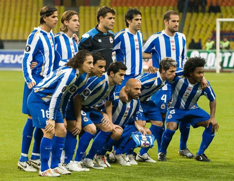 Alineación del Deportivo de las Coruña, en 2008.